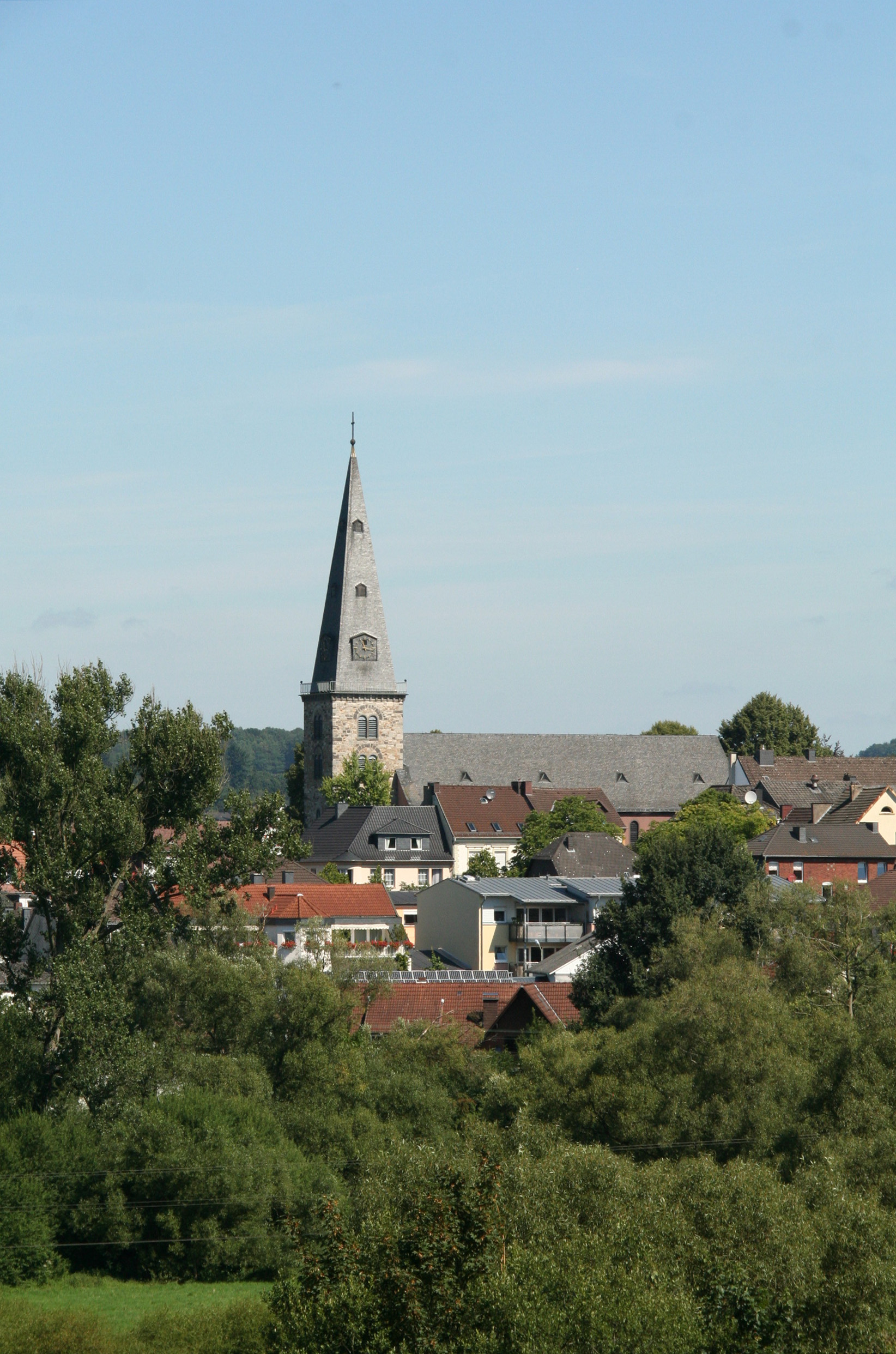 Altenkirchen (Westerwald), Stadtansicht mit ev. Christuskirche